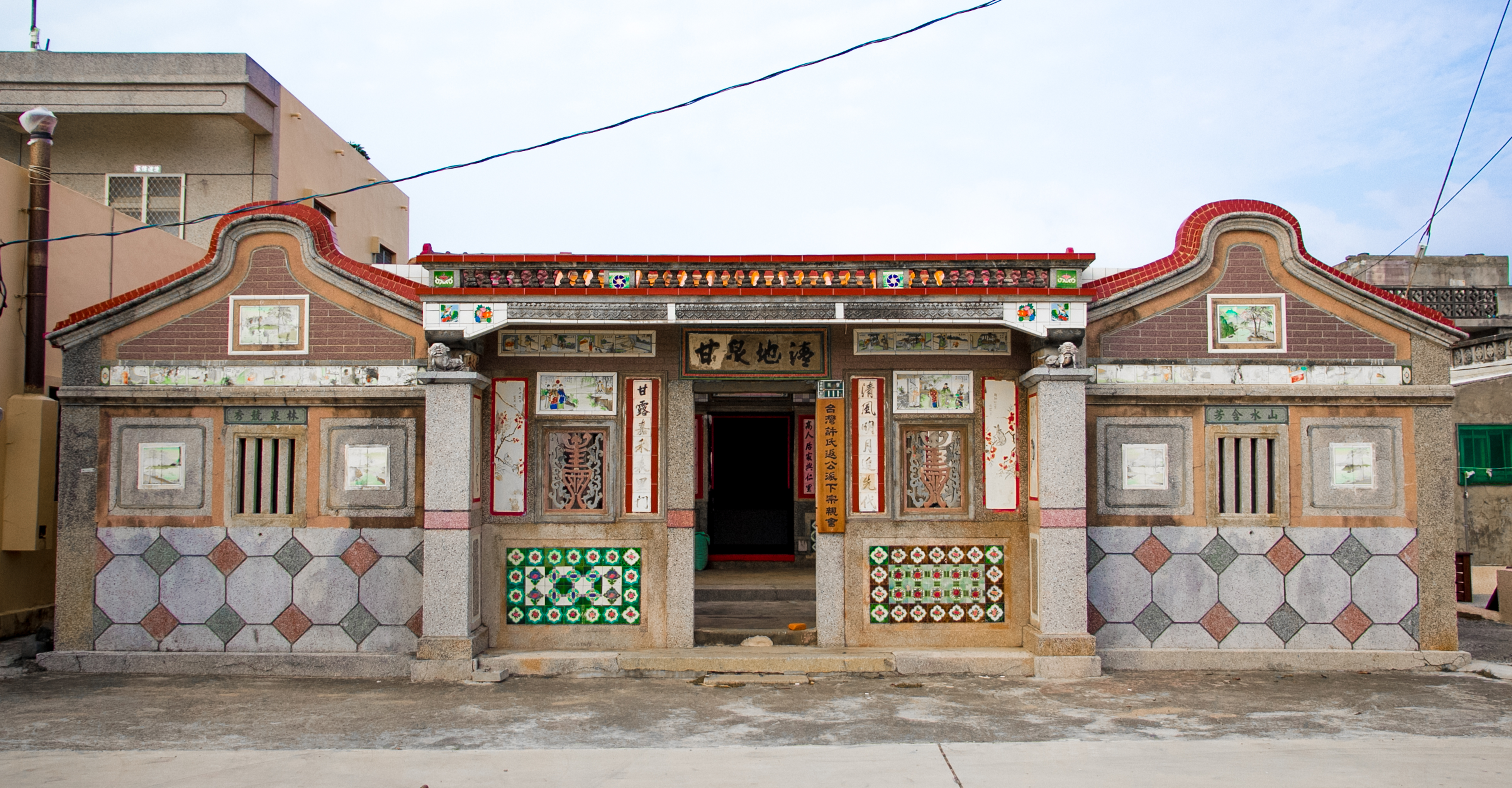 南寮許返古宅